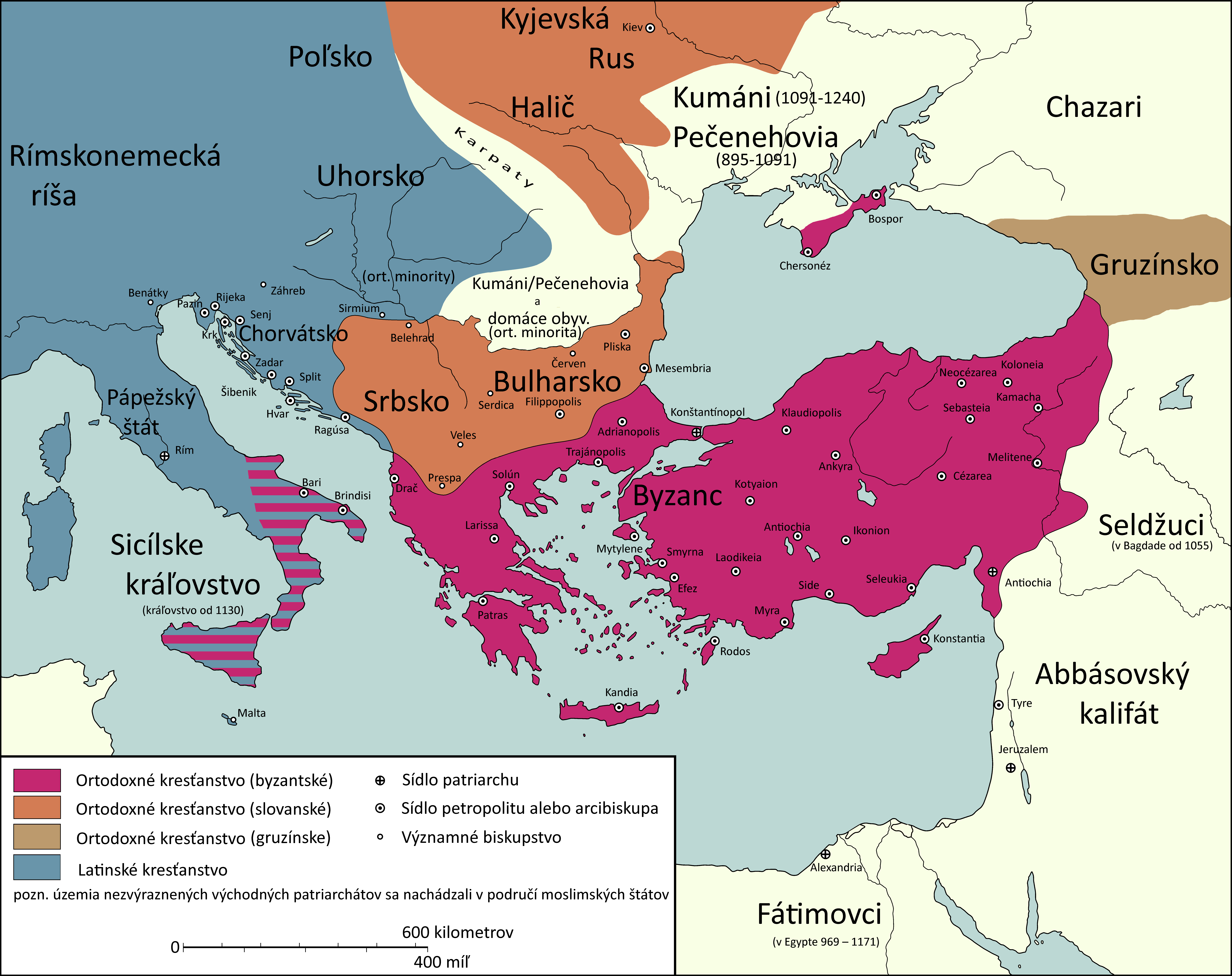 Východná schizma podľa: HALDON, J. The Palgrave Atlas of Byzantine History. : Springer, 2005. ISBN 978-0-230-27395-5. (po anglicky) S. 96 + úpravy